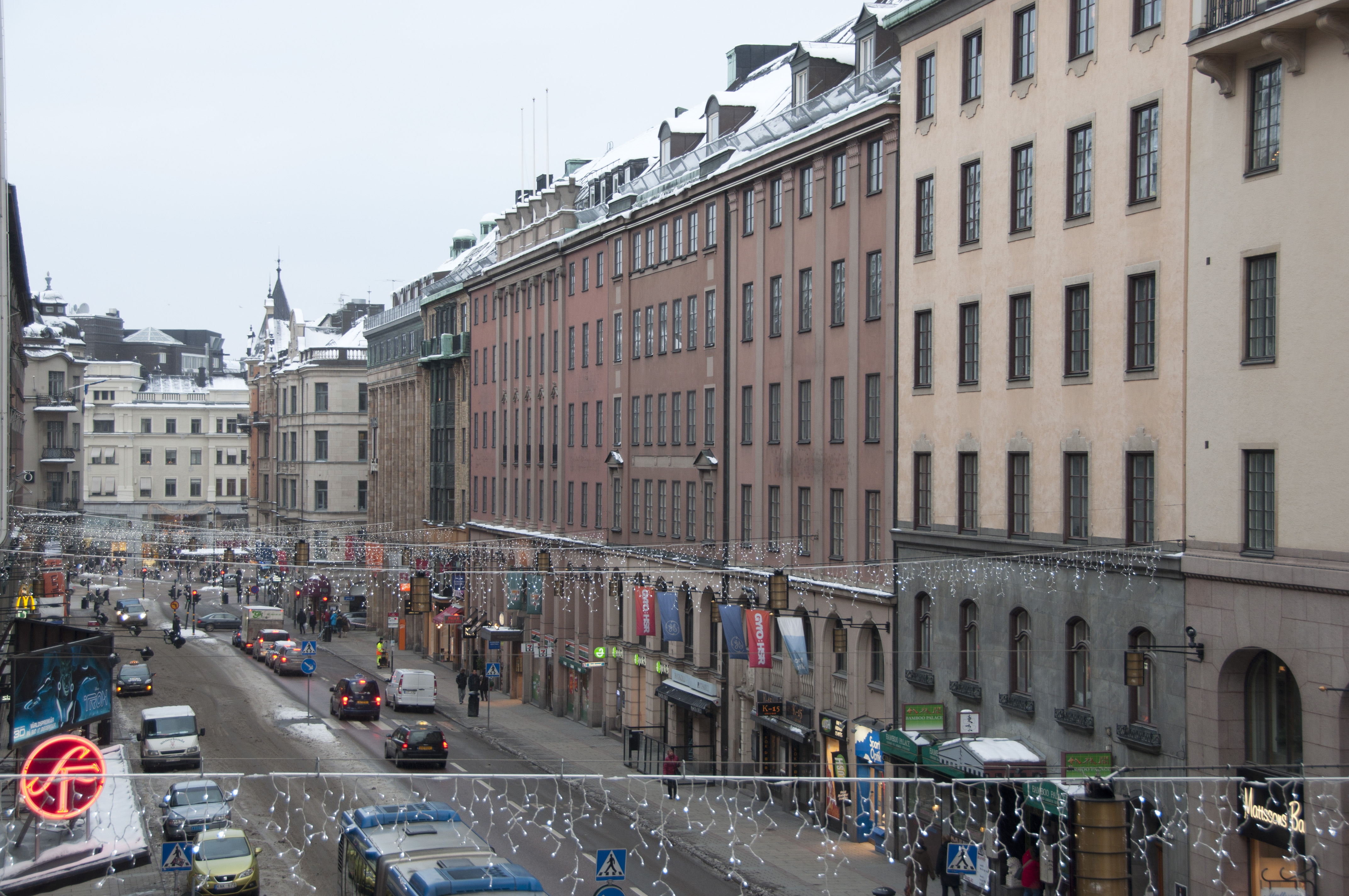 Kungsgatan 1-23 Kungsgatan 1: Byggnadsår 1893-95, arkitekter Edward Ohlsson (fasad) och Carl Kleitz Kungsgatan 3: Byggnadsår 1898-1900, arkitekt Sam Kjellberg Kungsgatan 5: Byggnadsår 1908-10, arkitekt Ernst Stenhammar Kungsgatan 7: Byggnadsår 1912-14 Frumerie & Sundstrand Kungsgatan 9-13: Byggnadsår 1918-20 Östlihn och Stark, byggherre Försäkrings AB Svenska Lloyd Kungsgatan 15: Byggnadsår 1920-22, arkitekt Höög & Morssing Kungsgatan 17: Byggnadsår 1918-21, arkitekt Ivar Tengbom, Byggherre Metallfabriks AB C C Sporrong & Co